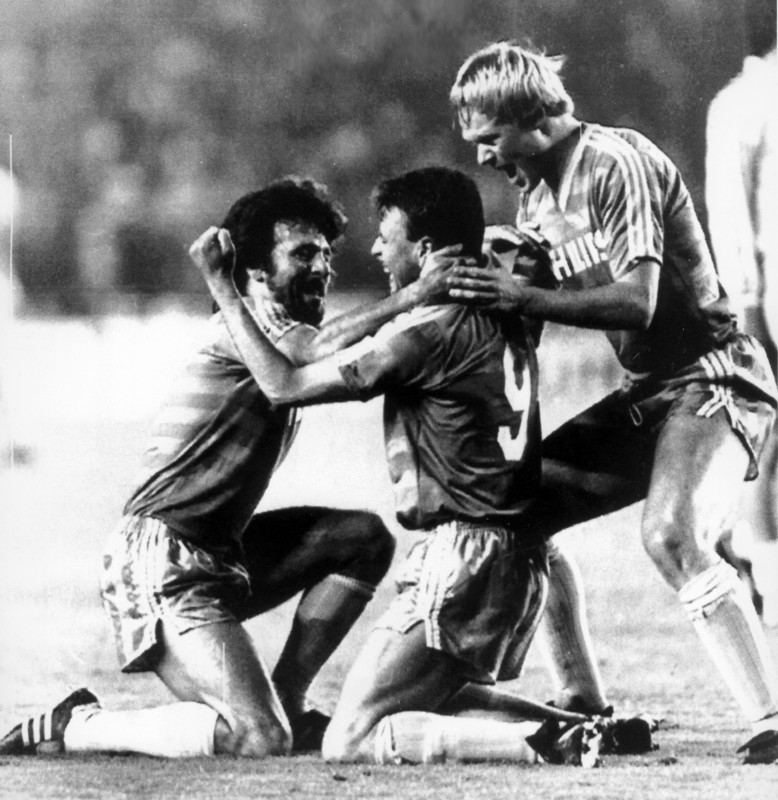 Voetbal, Europacup (EC) I , Seizoen 1987/1988, Halve finale, Real Madrid-PSV (uitslag1-1). Intense vreugde bij de PSV-ers vlnr Eric Gerets, Edward Linskens (Hij heeft net met een rollertje gescoord), en Ronald Koeman. Santiago Bernabéu Stadion Madrid (Spanje) 7 april 1988.